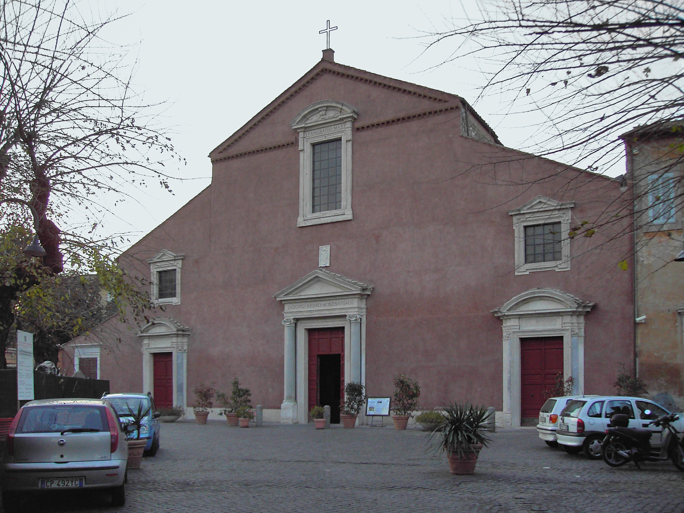 Roma, chiesa di san Pancrazio - facciata.